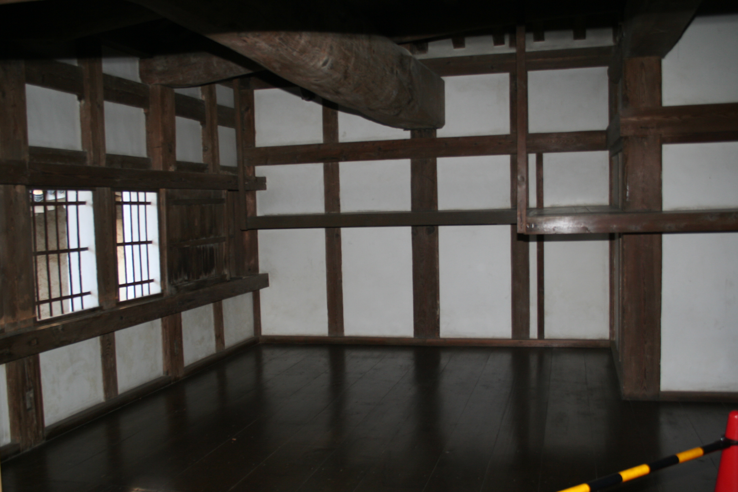 2009年秋の姫路城。 乾小天守1階部分。